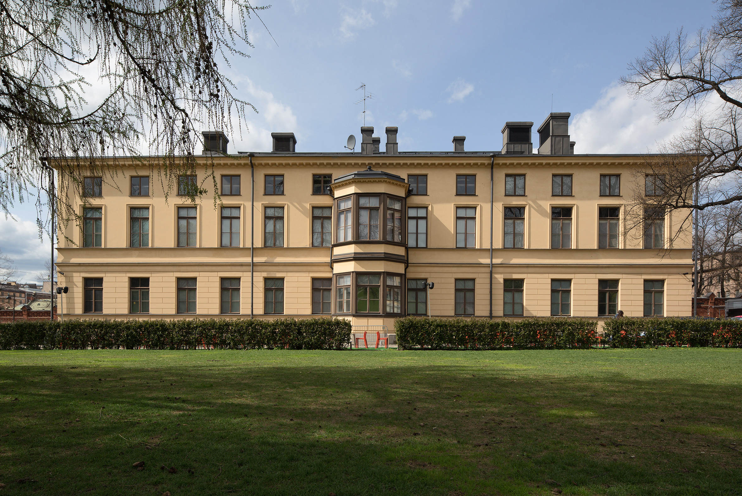 Sinebrychoffin taidemuseo, kuva: Kansallisgalleria / Hannu Aaltonen